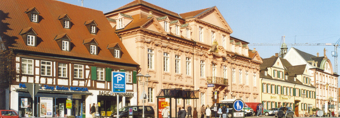 Prachtachse von Offenburg : Alter Marktplatz und mittlere Hauptstraße - hier schönste Partie mit Fachwerkhaus, ehemaligem Königshof, Gasthof Sonne und dem Rathaus (von links nach rechts)